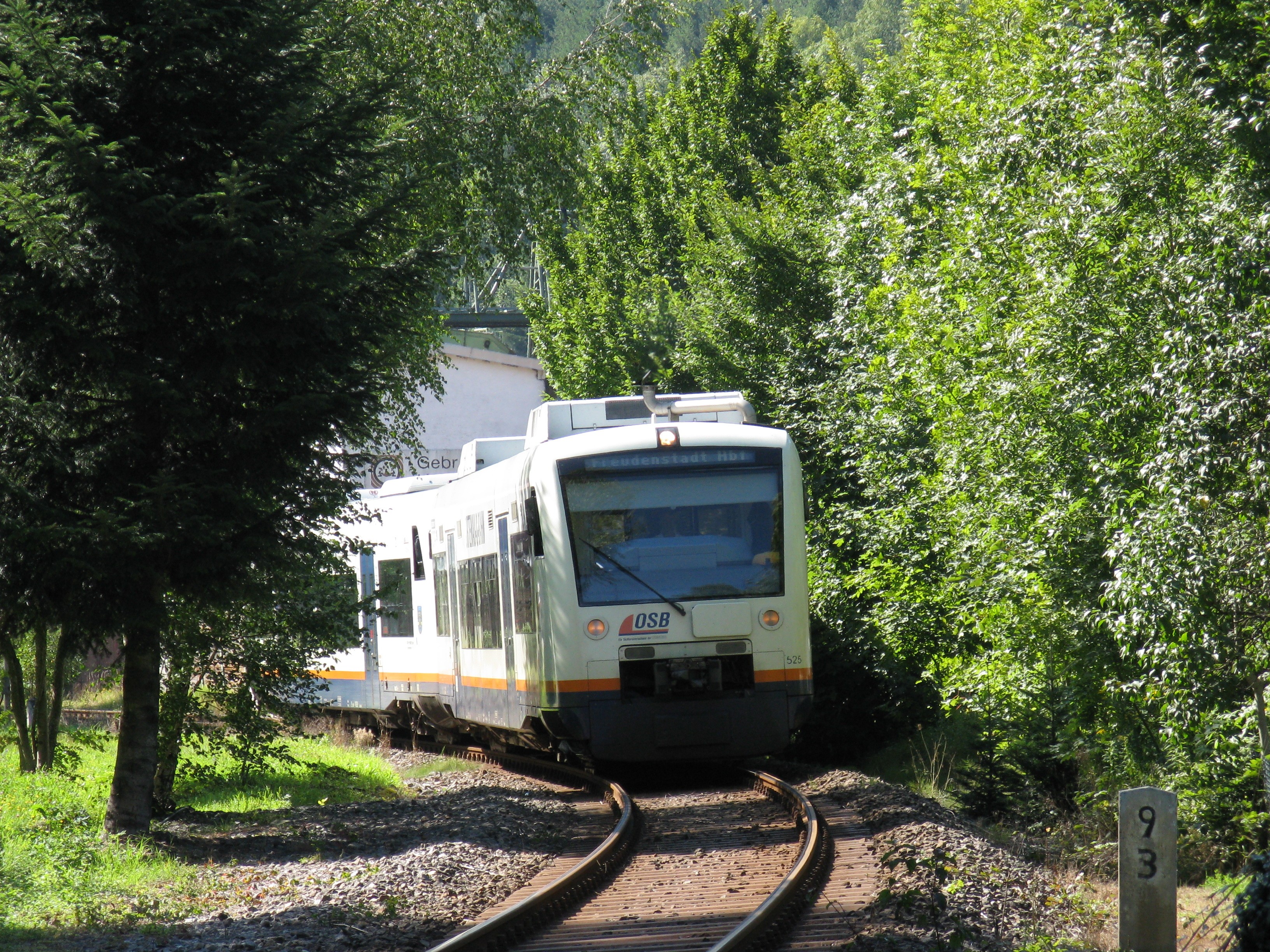 Regioshuttle RS1 of the Ortenau-S-Bahn leaving the station of Halbmeil on the Kinzigtalbahn in direction Freudenstadt, un Regioshuttle RS1 de la Ortenau-S-Bahn partant de Halbmeil (Kinzigtalbahn) en direction de Freundenstadt, ein Regioshuttle RS1 der OSB verläßt den Bahnhof Halbmeil (Kinzigtalbahn) in Richtung Freudenstadt.